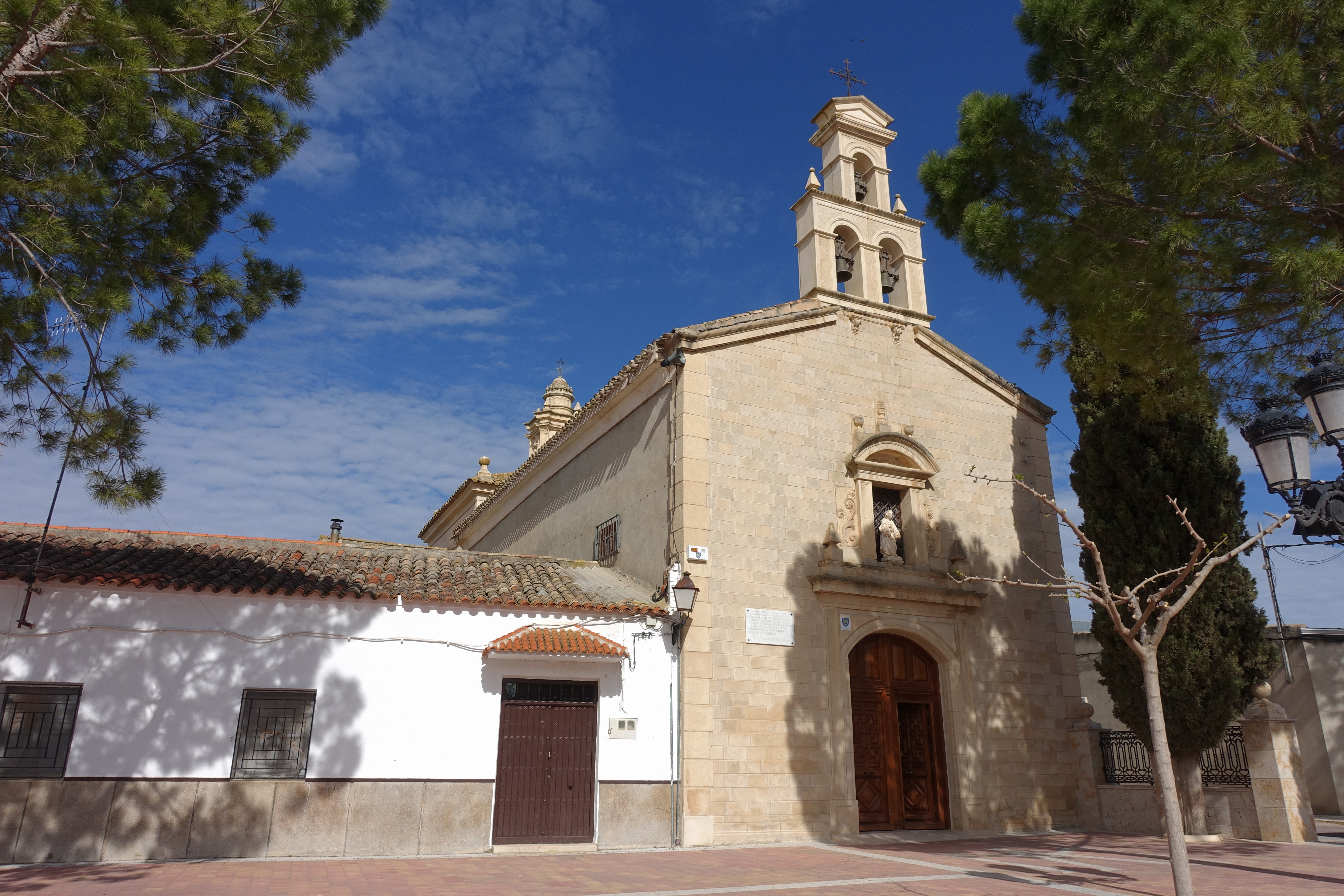 Ermita de la Virgen del Amparo, Santa María del Campo Rus (Cuenca, España).